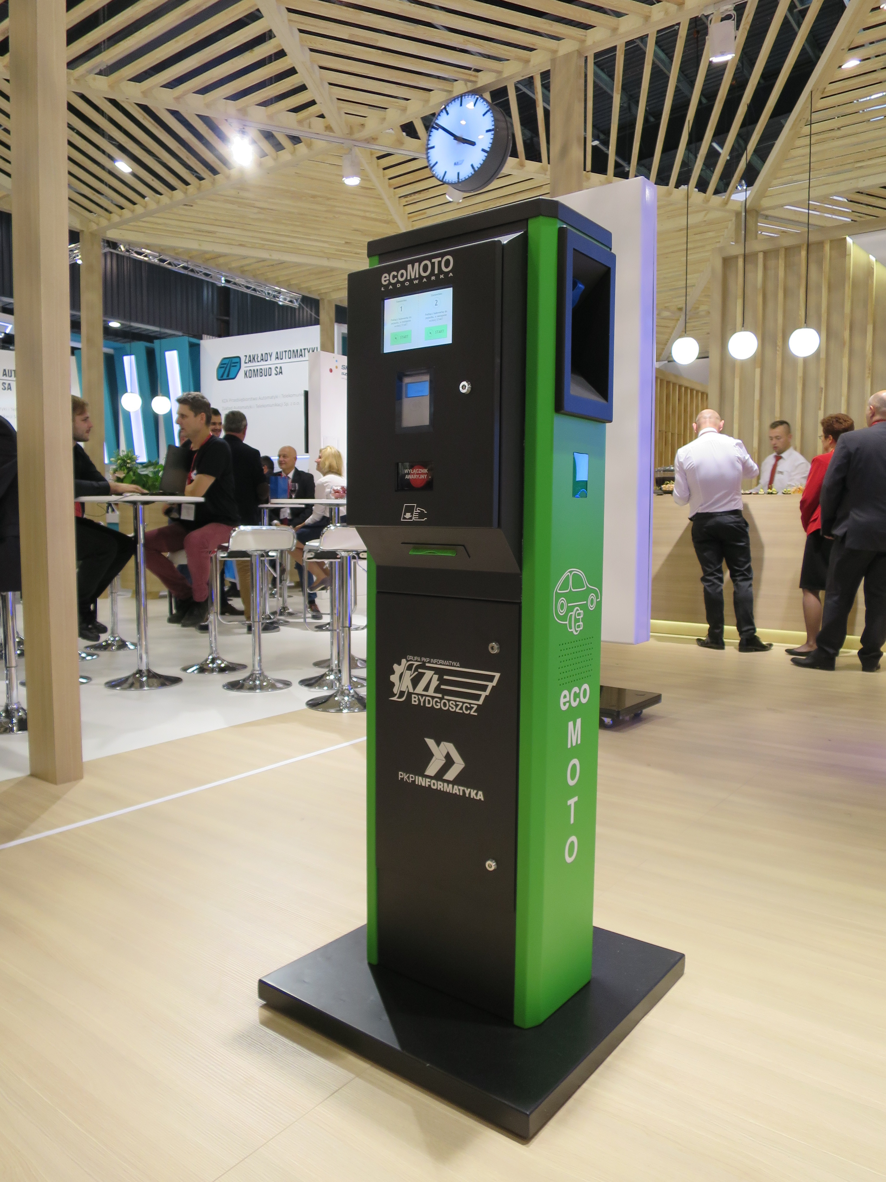 The making of this document was supported by Wikimedia Polska Association, within Wikigrant no. WG 2017-44. ecoMOTO ładowarka samochodów elektrycznych KZŁ Bydgoszcz